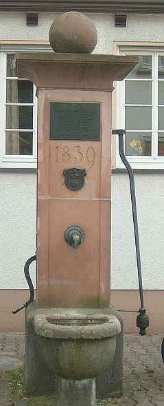 die Gemaabump, eine ehemals öffentliche Wasserpumpe, ein klassizistischer Sandsteinpfeiler mit Becken auf einem würfelförmigen Sockel, bekrönt mit einer Kugel. Der Brunnen ist jährlich der Ausgangspunkt für den Faschingsumzug in Klein Paris. Die seitlichen verschieden hoch angebrachten Schwengel ermöglichten es auch Kindern zu pumpen.